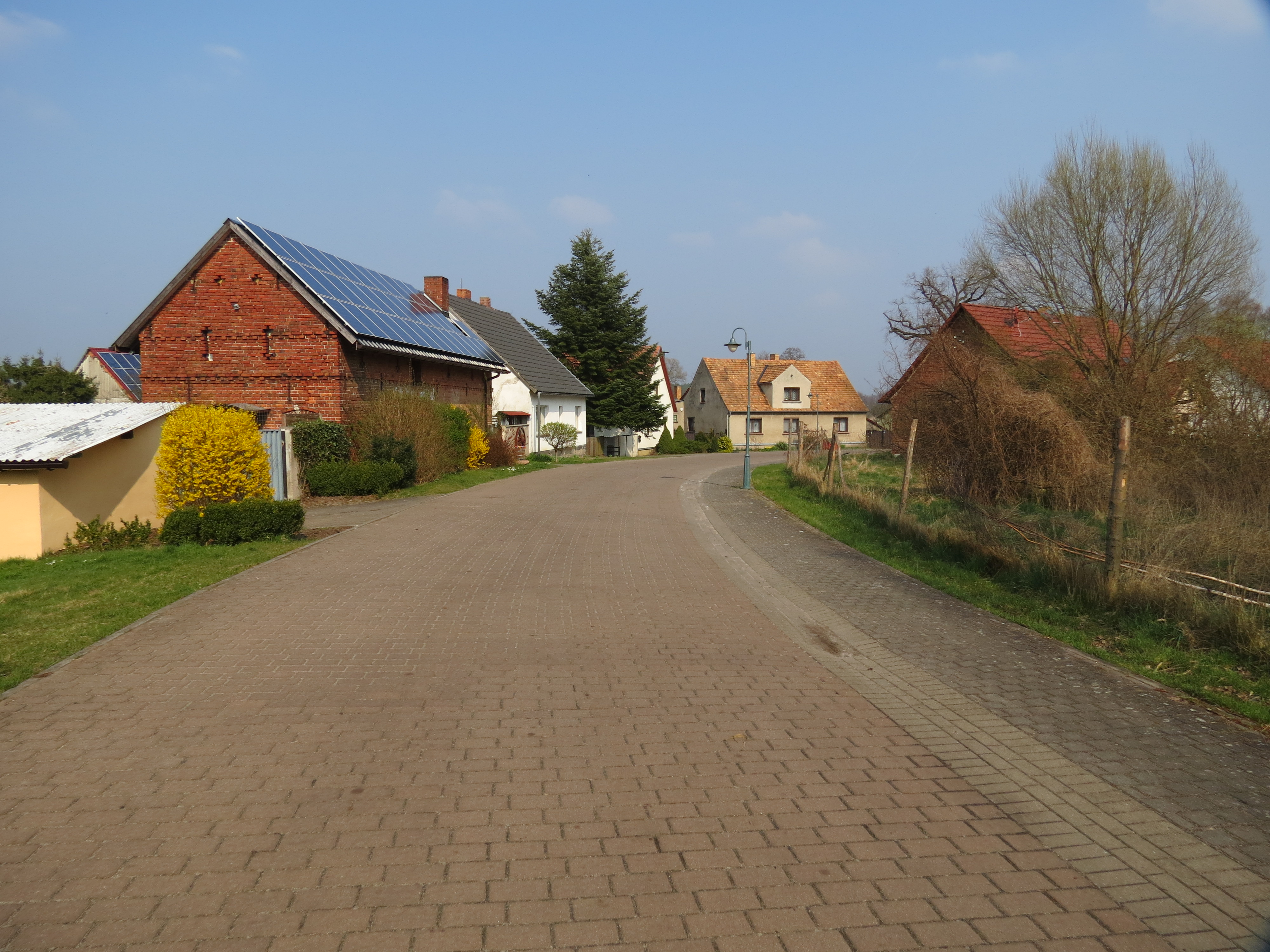 Blasdorf, Ortsteil der Stadt Lieberose, Lkr. Dahme-Spreewald, Brandenburg, Deutschland, Dorfstraße, etwa Höhe Blasdorf 2, Blick nach Nordosten